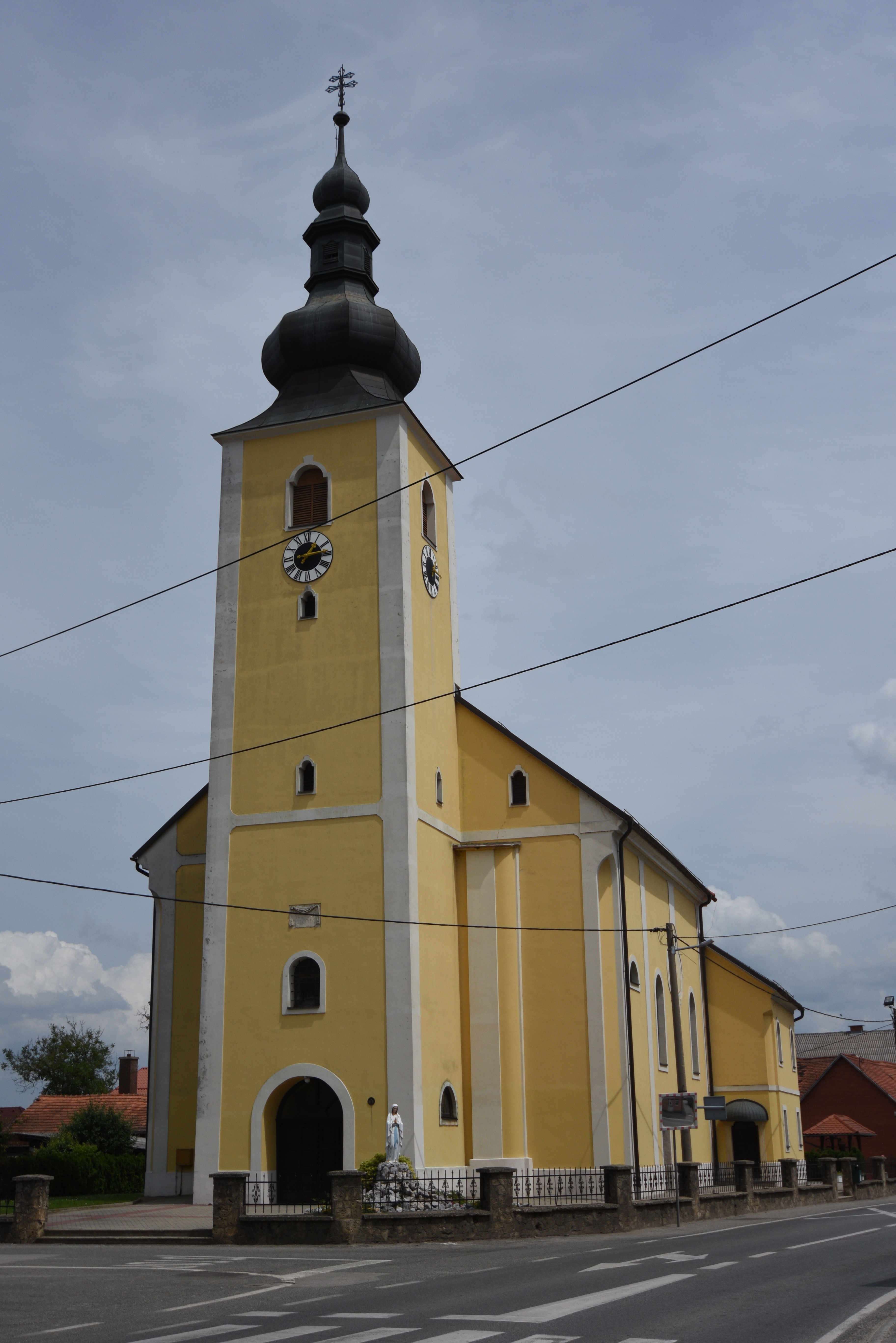 Crkva Svetog Vida Vidovec Church Kirche